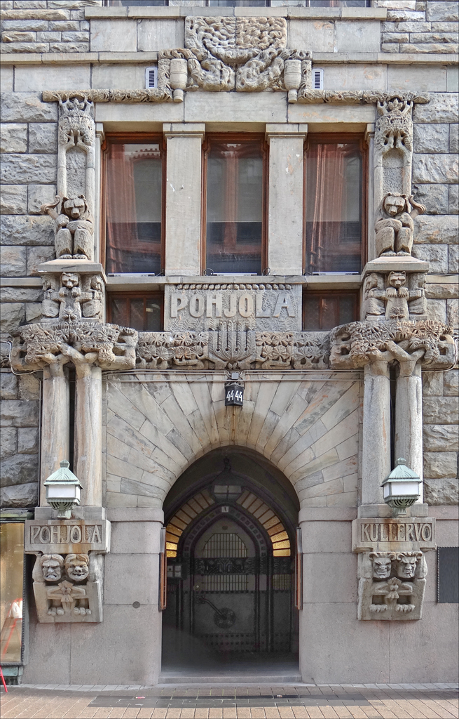 L'immeuble jugendstil (art nouveau) de la compagnie d'assurance Pohjola a été conçu par Eliel Saarinen, il a été construit en 1901. Le décor de la façade a été réalisé par Hilda Flodin.